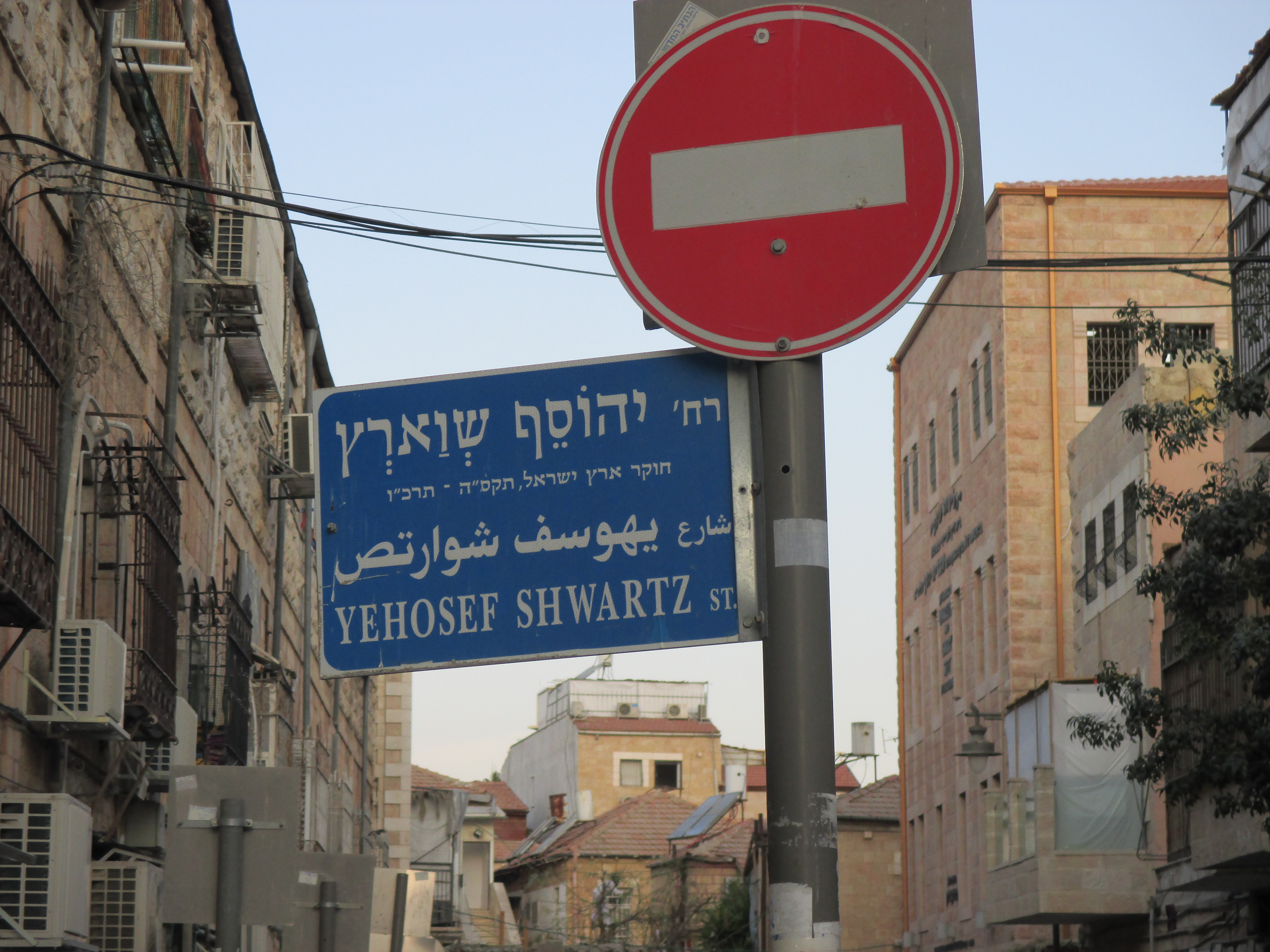 השלט על רחוב יהוסף שוורץ בירושלים